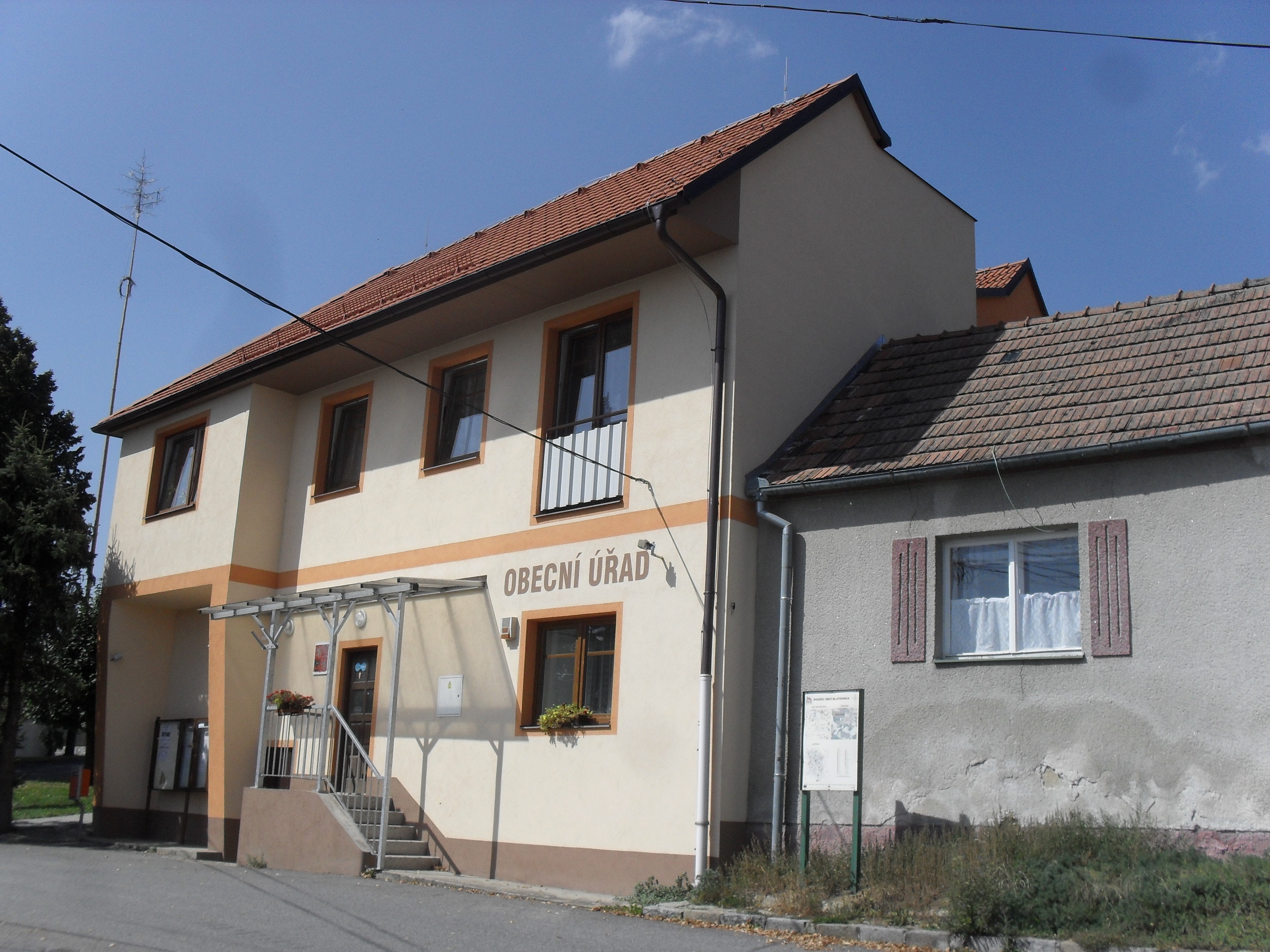 Fotografie pořízena v obci Čečelovice.